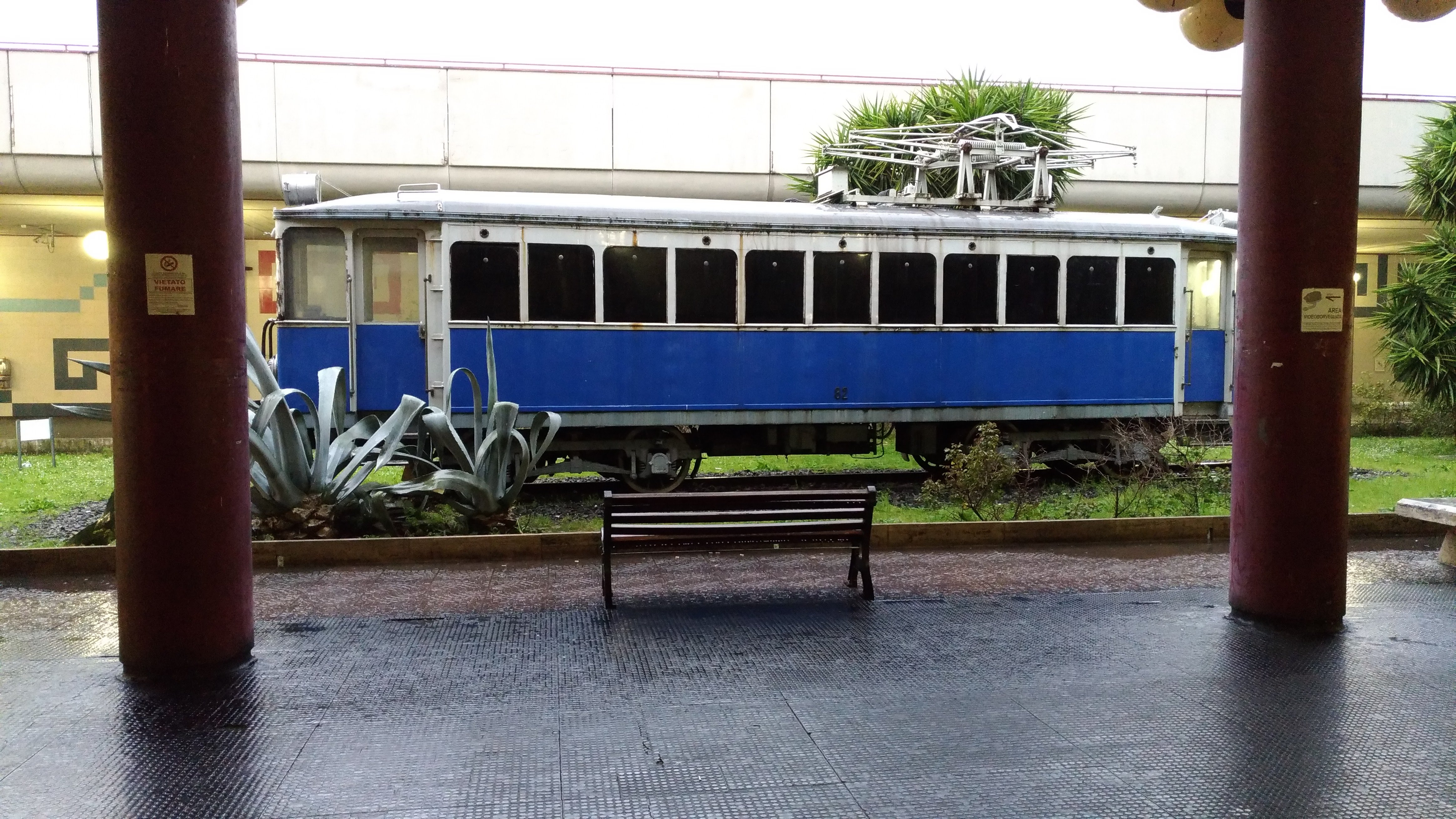 L'elettromotrice N°82 STEFER presso la Stazione Metro della Linea A di Roma Anagnina